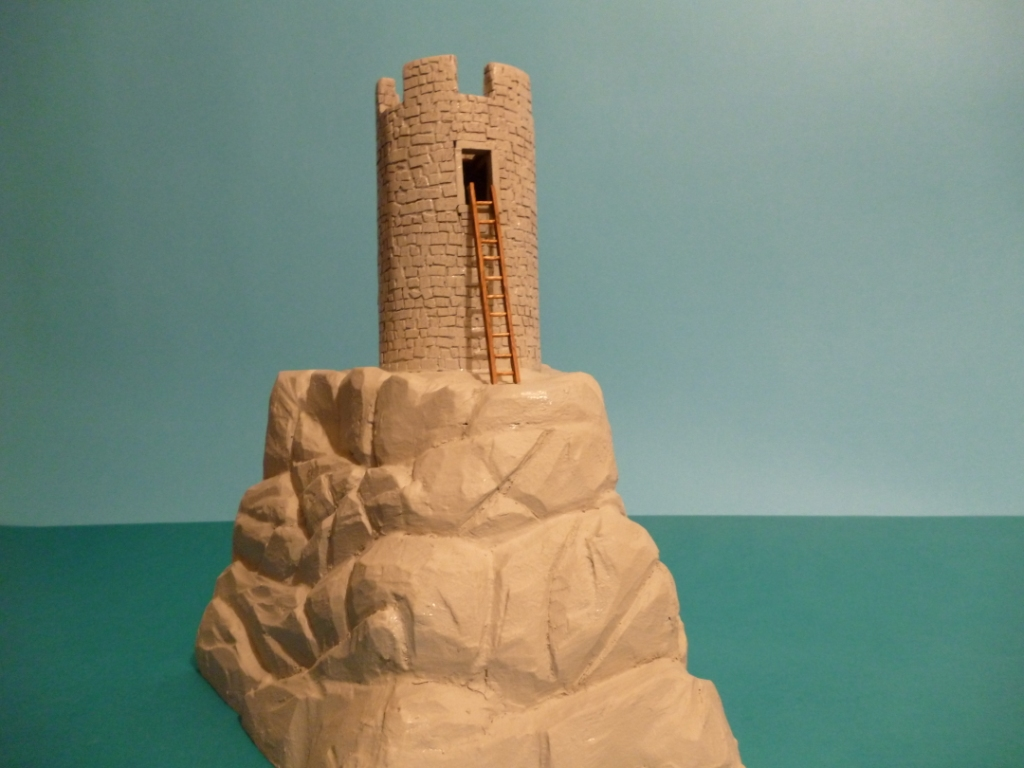 maketa stražarske kule u Lažanima, Kaštel Kambelovac